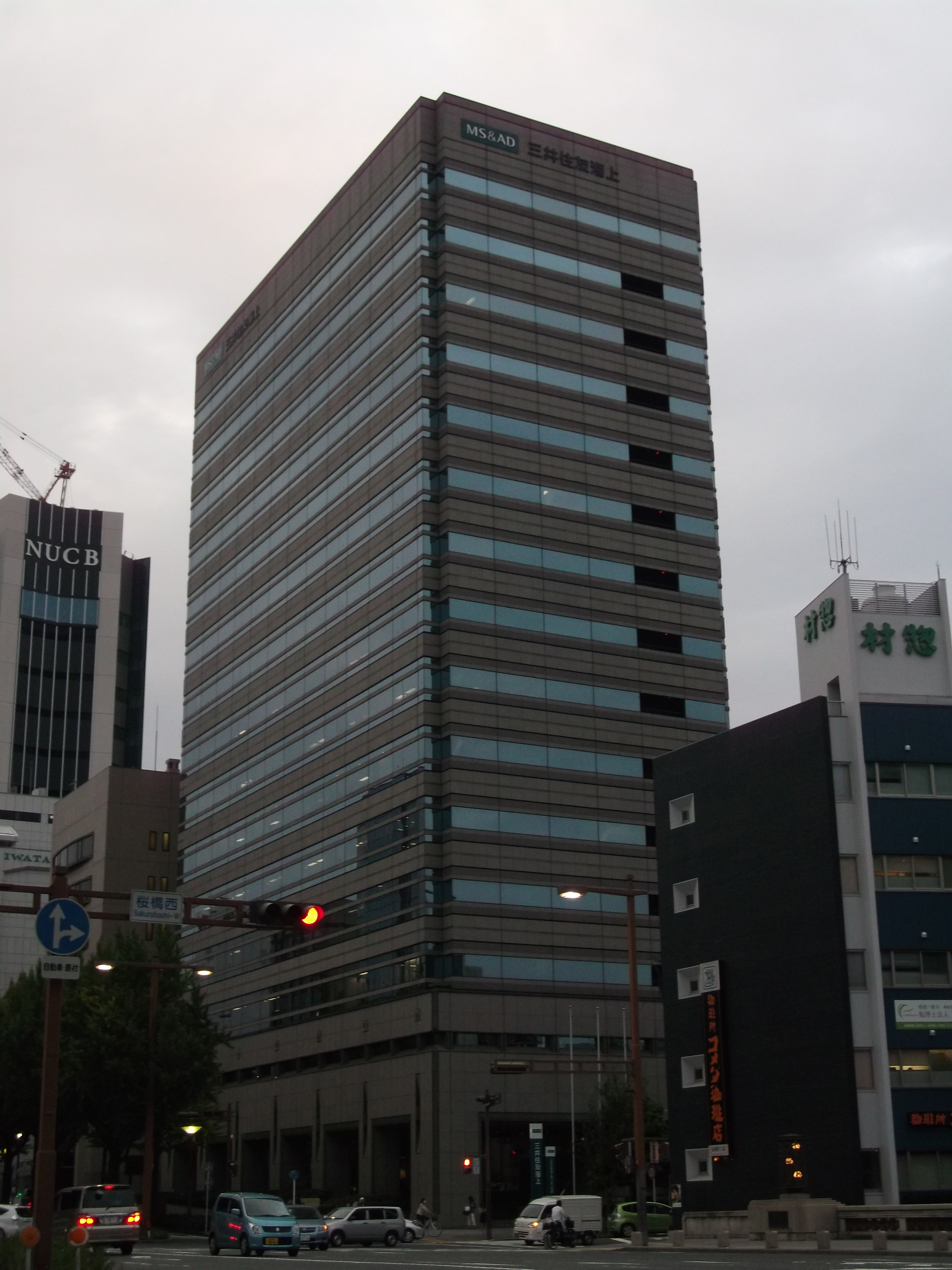 名古屋市中区の三井住友海上名古屋ビルを北側公道（桜通）西側より撮影